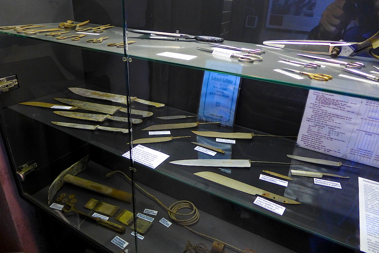 "Тропа Клинка" - туристский маркированнный маршрут вокруг немецкого города Золинген (Северный Рейн-Вестфалия). Шестой этап: вдоль реки Вуппер. 8.0 км.